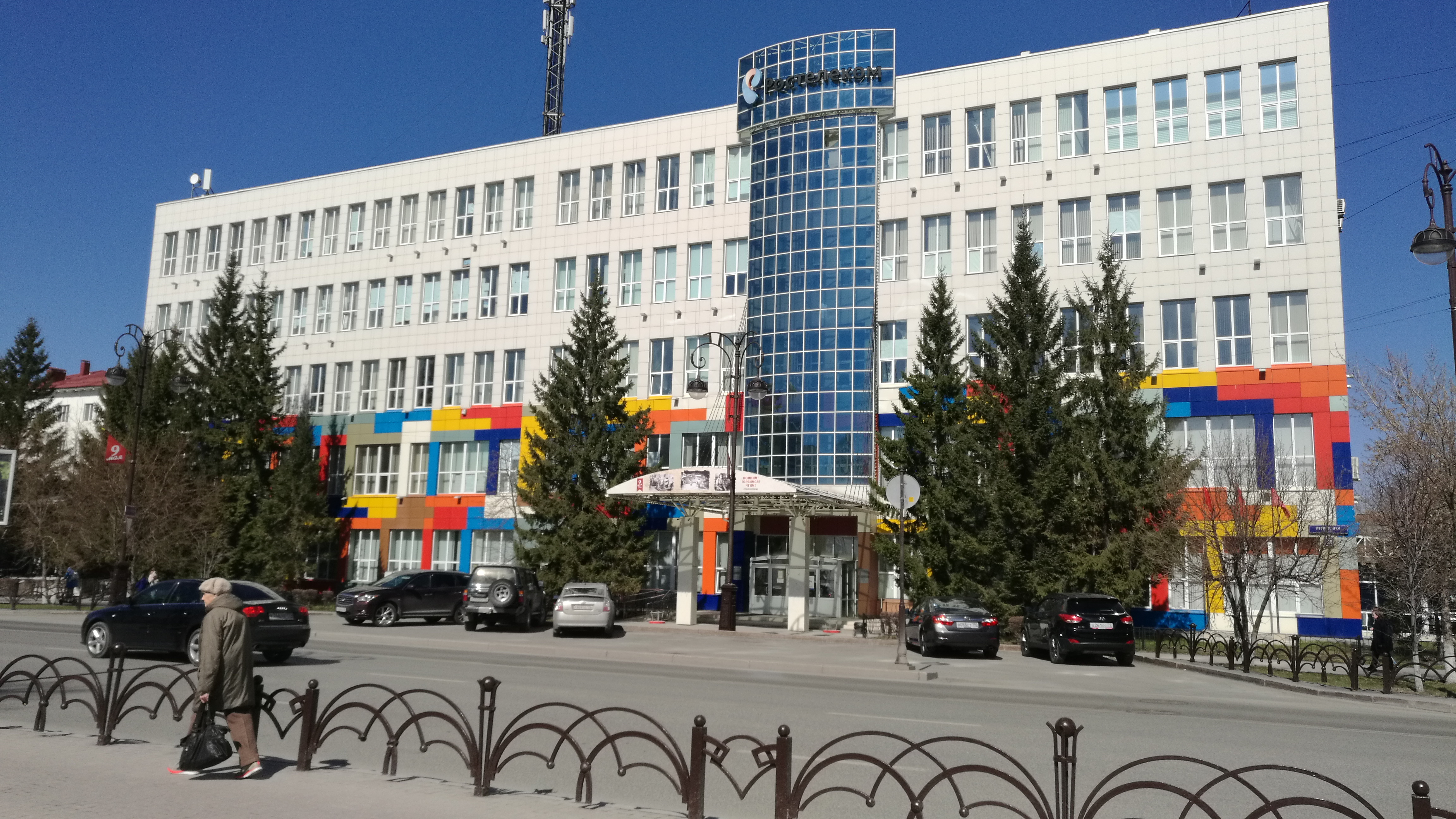 Ĉefsidejo de Rostelekom. Tjumeno, Rusio.